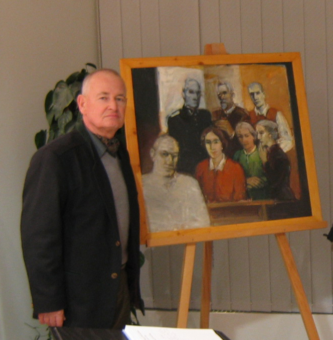 Gerhart Lampa neben Gemälde seiner Familie, Ausstellung in Salzbergen im März 2007